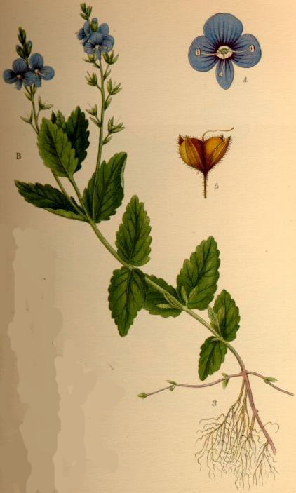 Teveronika (Veronica chamaedrys) 3 växten i blom, 4 blomma (2/1), 5 blomfoder och fröhus från höger sida (3/1)